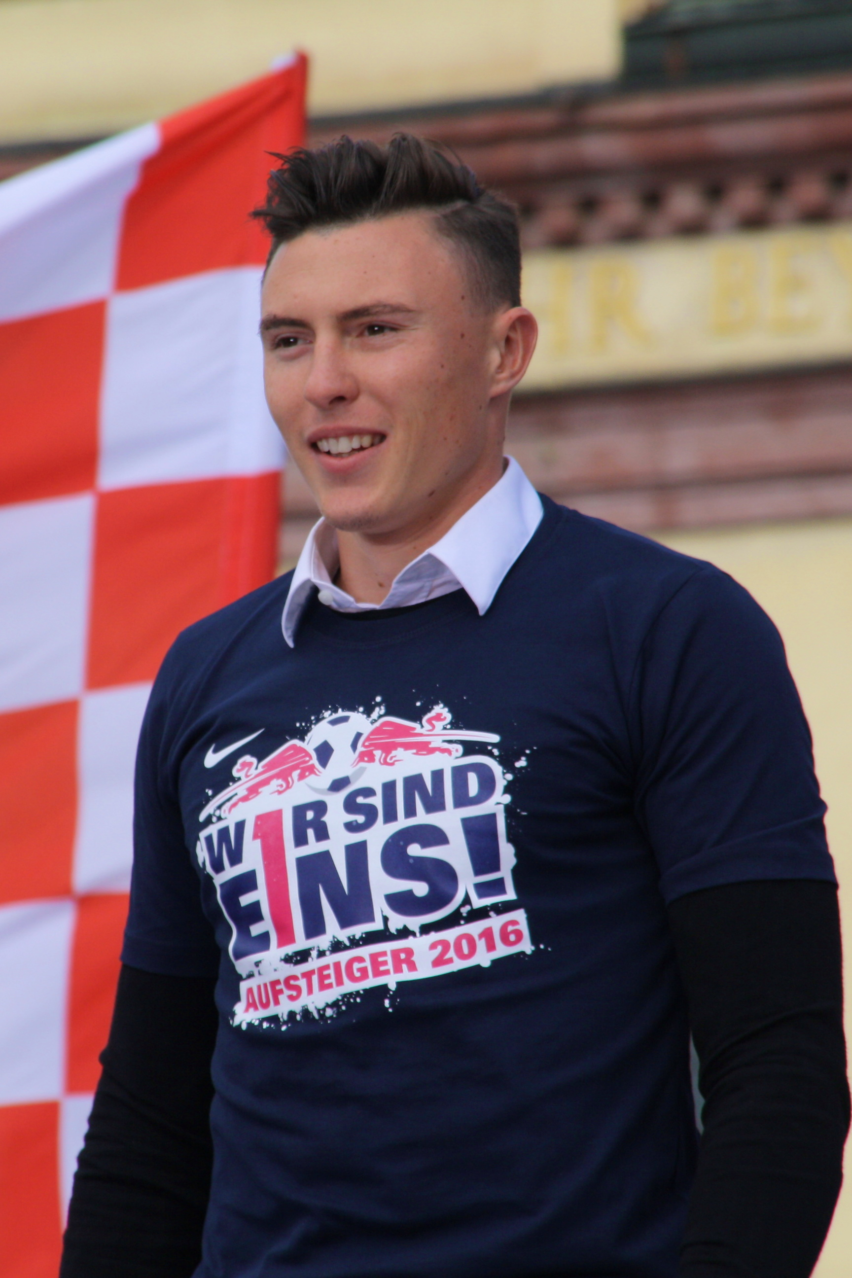 Nils Quaschner bei der Aufstiegsfeier von RB Leipzig 2016